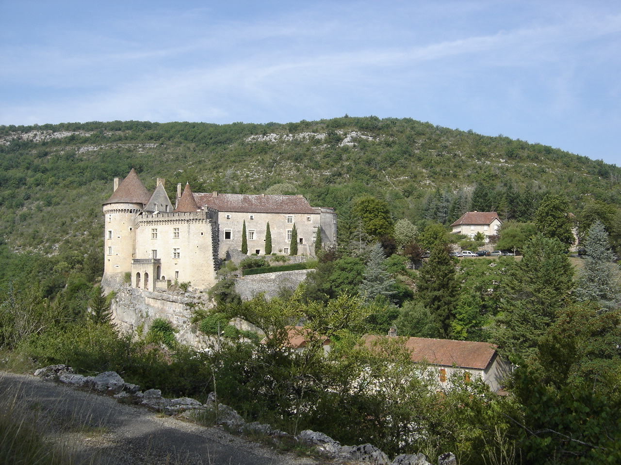 Chateau de Cabrerets